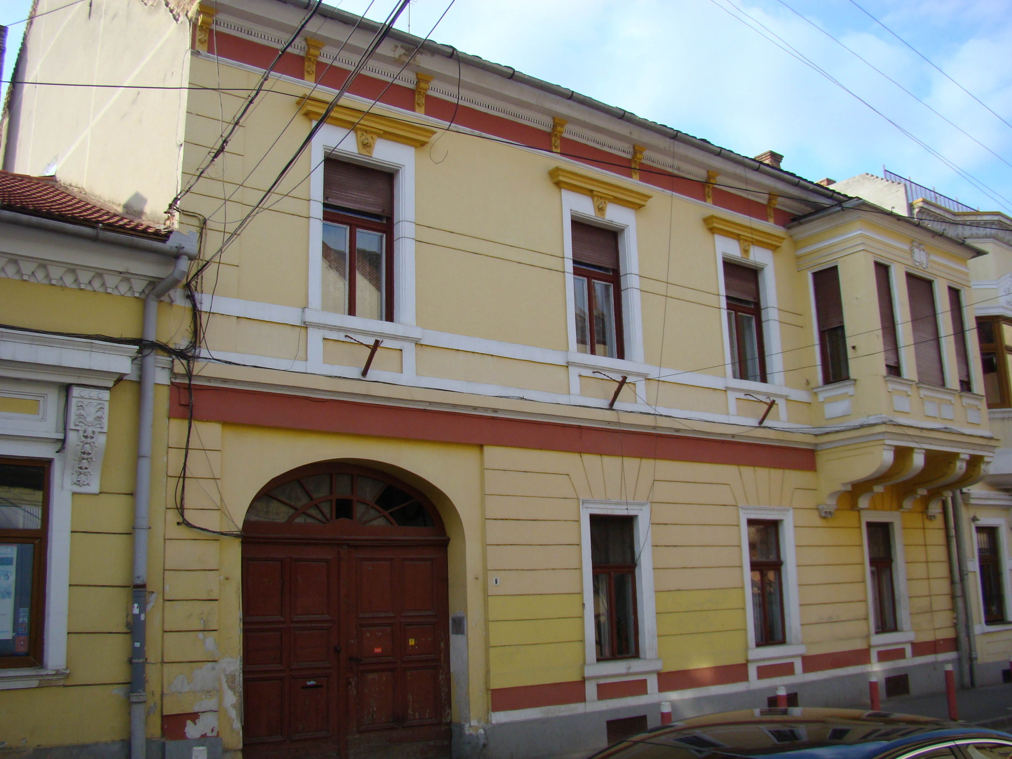 Casă monument istoric Iuliu Maniu, nr.9